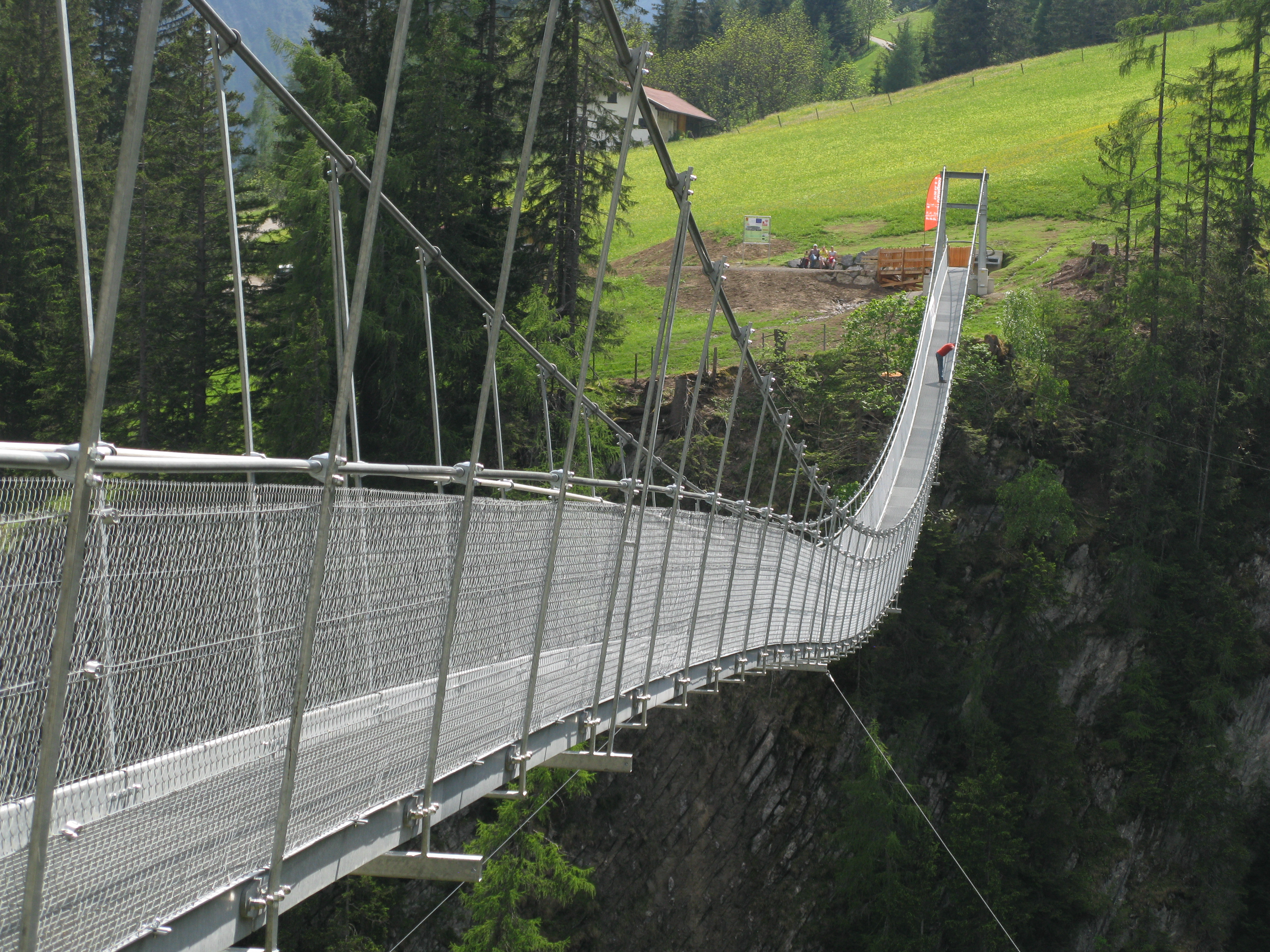 Hängebrücke in Holzgau (Österreich)